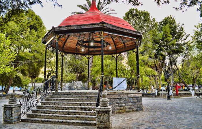 Hermoso Kiosko de San Buenaventura desde 1899 by: ECRodriguez